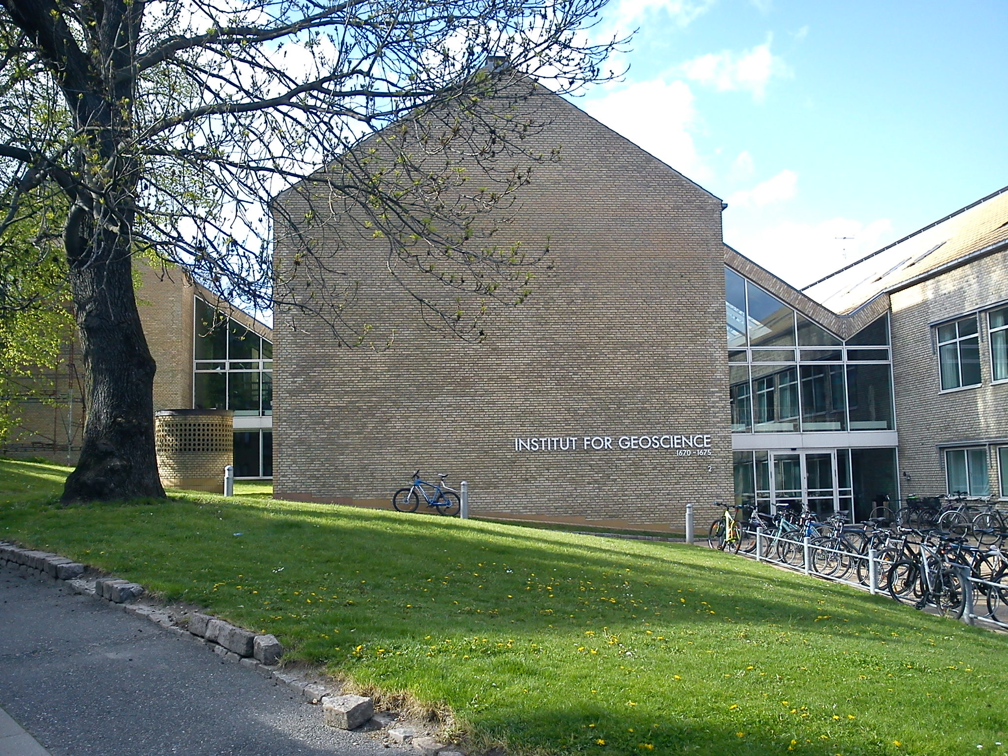 Institut for Geo-videnskab ved Aarhus Universitet.